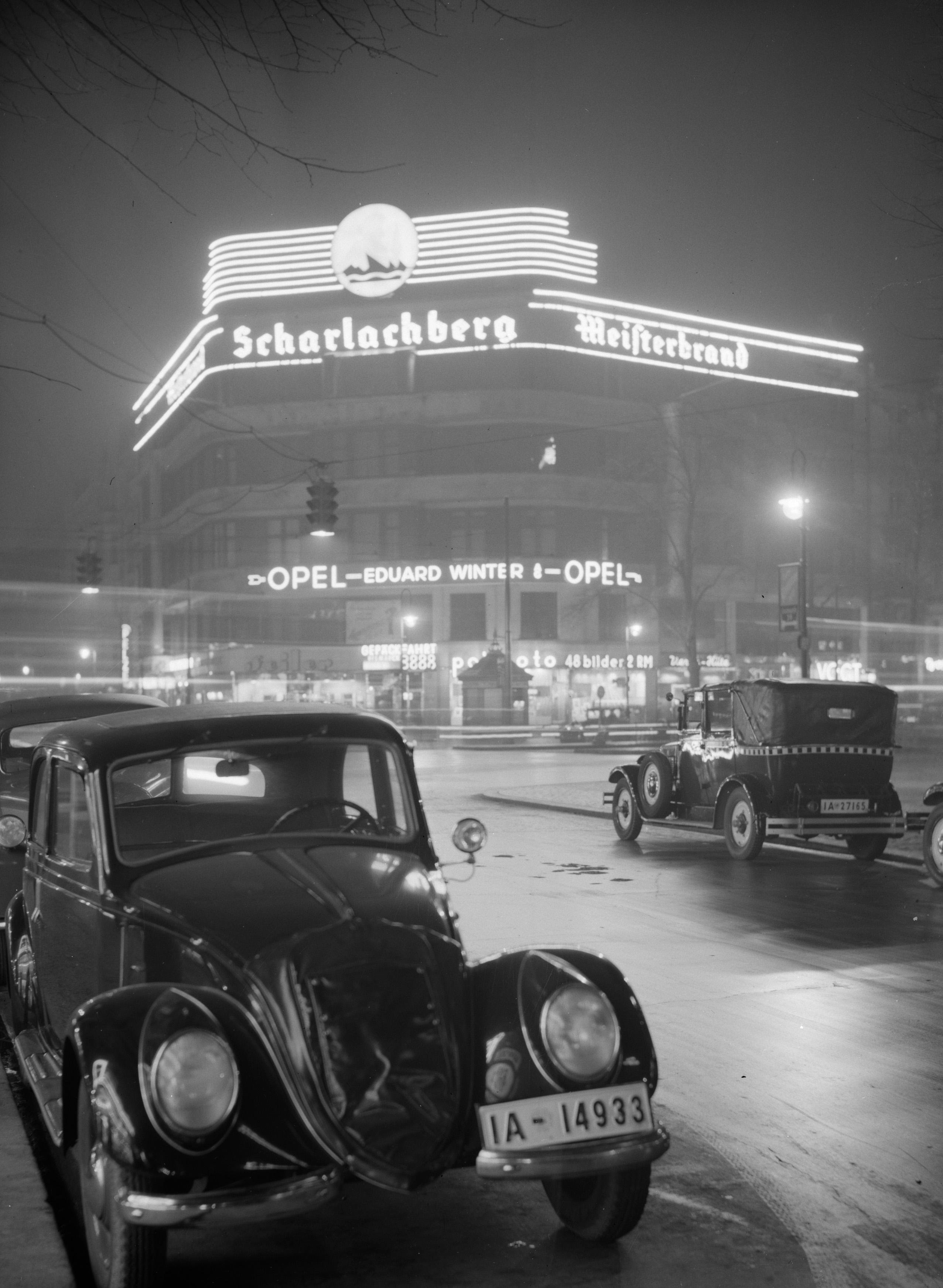 Collectie / Archief : Fotocollectie Van de Poll Reportage / Serie : Reportage Berlijn Beschrijving : Berlijn. Nachtopname in de buurt van de Kurfurstendamm met lichtreclames van Opel en Scharlachberg met op de voorgrond geparkeerde auto's Datum : November 1935 Locatie : Berlijn, Duitsland, Kurfürstendamm Trefwoorden : auto's, reclame, stadsbeelden, winkels Fotograaf : Poll, Willem van de, [onbekend] Auteursrechthebbende : Nationaal Archief Materiaalsoort : Glasnegatief Nummer archiefinventaris : bekijk toegang 2.24.14.02 Bestanddeelnummer : 191-0461